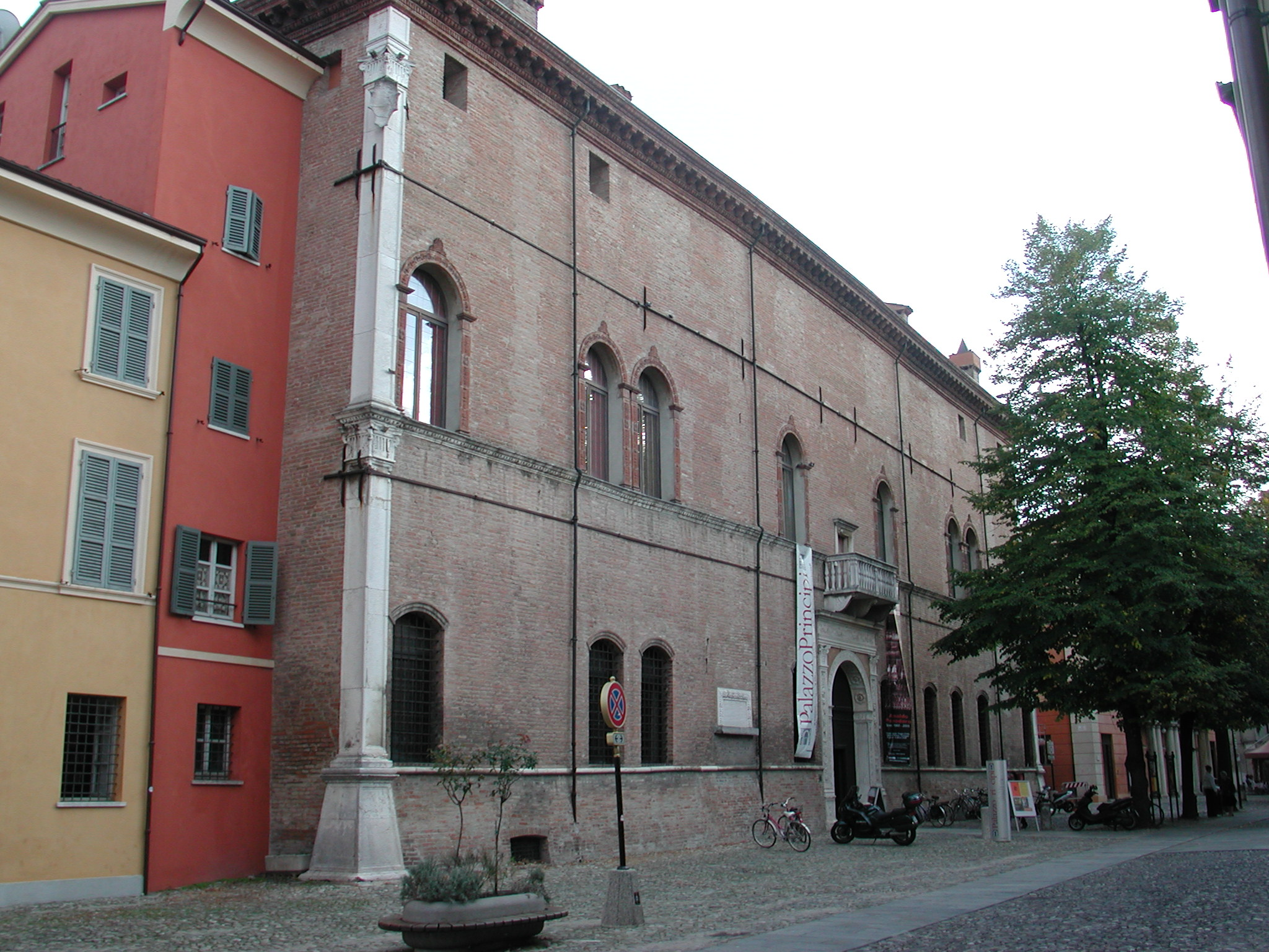 Correggio (Italy) a town near Reggio Emilia, Italy - palazzo dei Principi